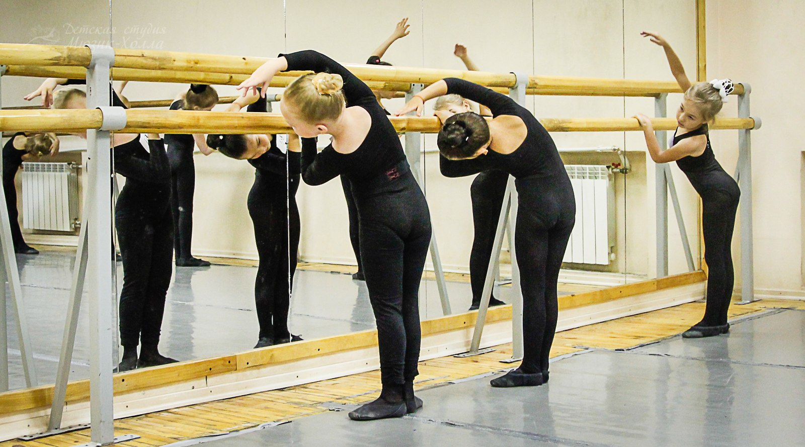 Урок классики